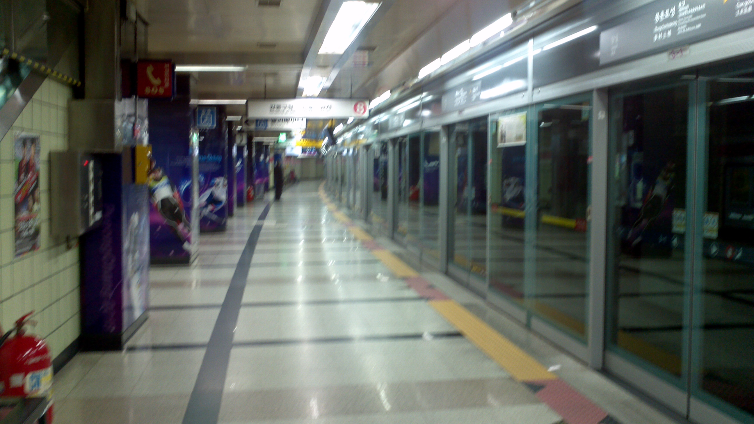 몽촌토성역 승강장